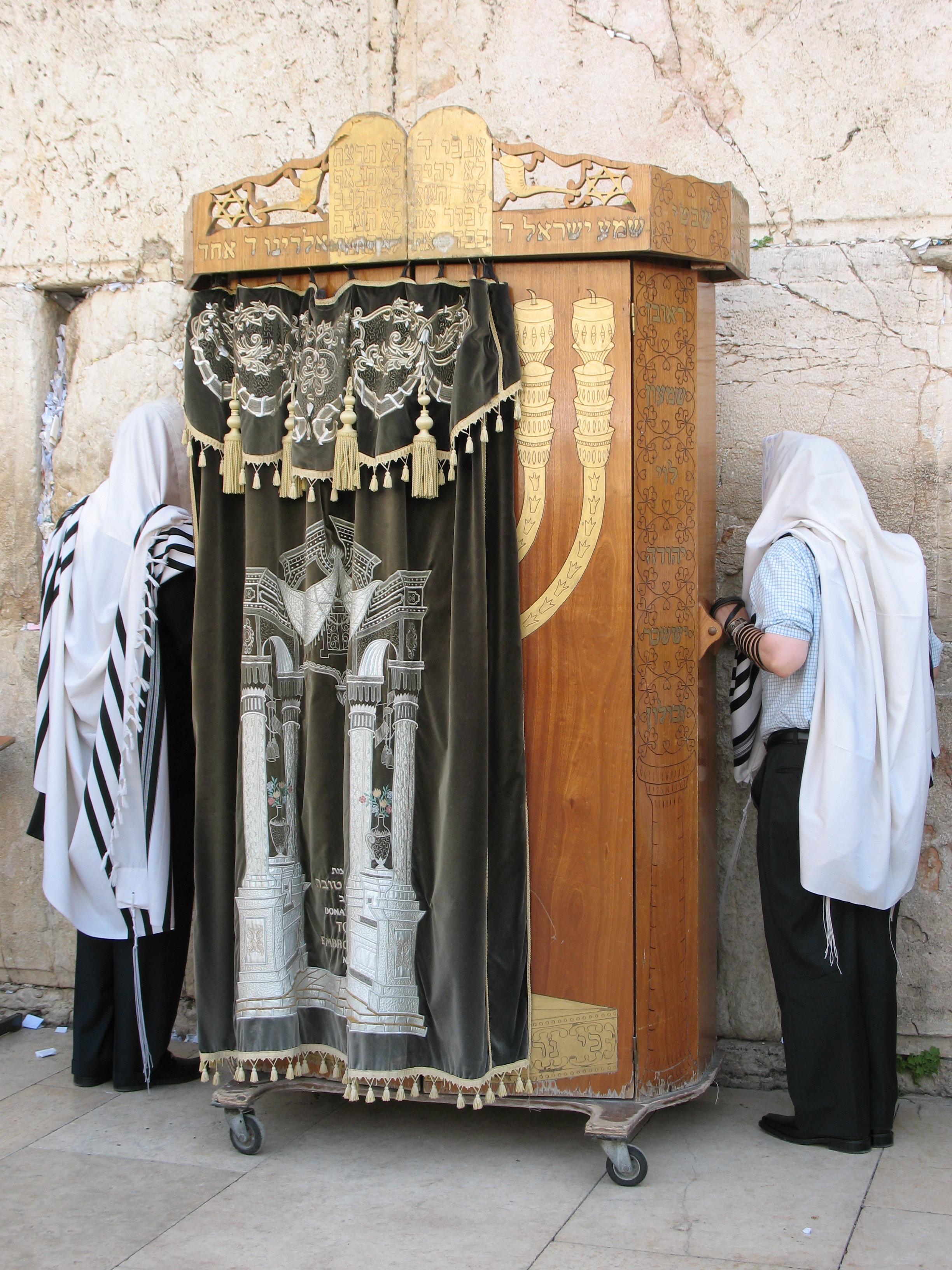 Western Wall_1841 Western/Wailing Wall